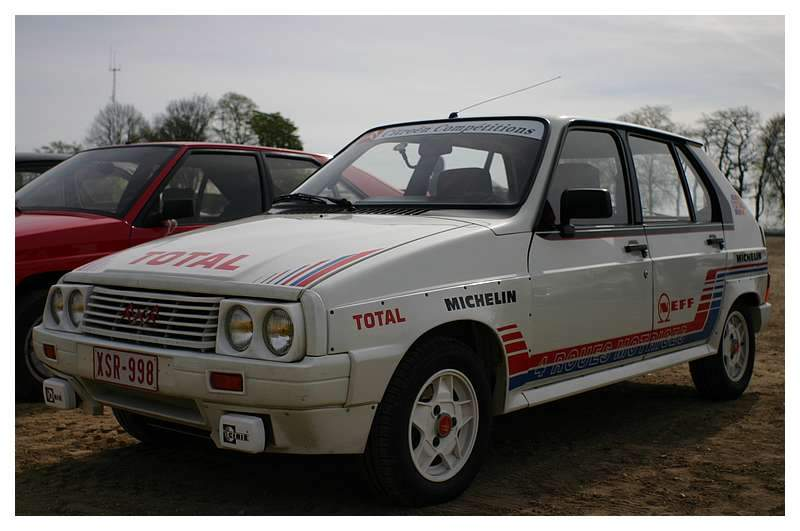 Citroën Visa 1000 Pistes photographiée lors du Jumble Citroën "C-Citadelle" à la Citadelle de Namur.